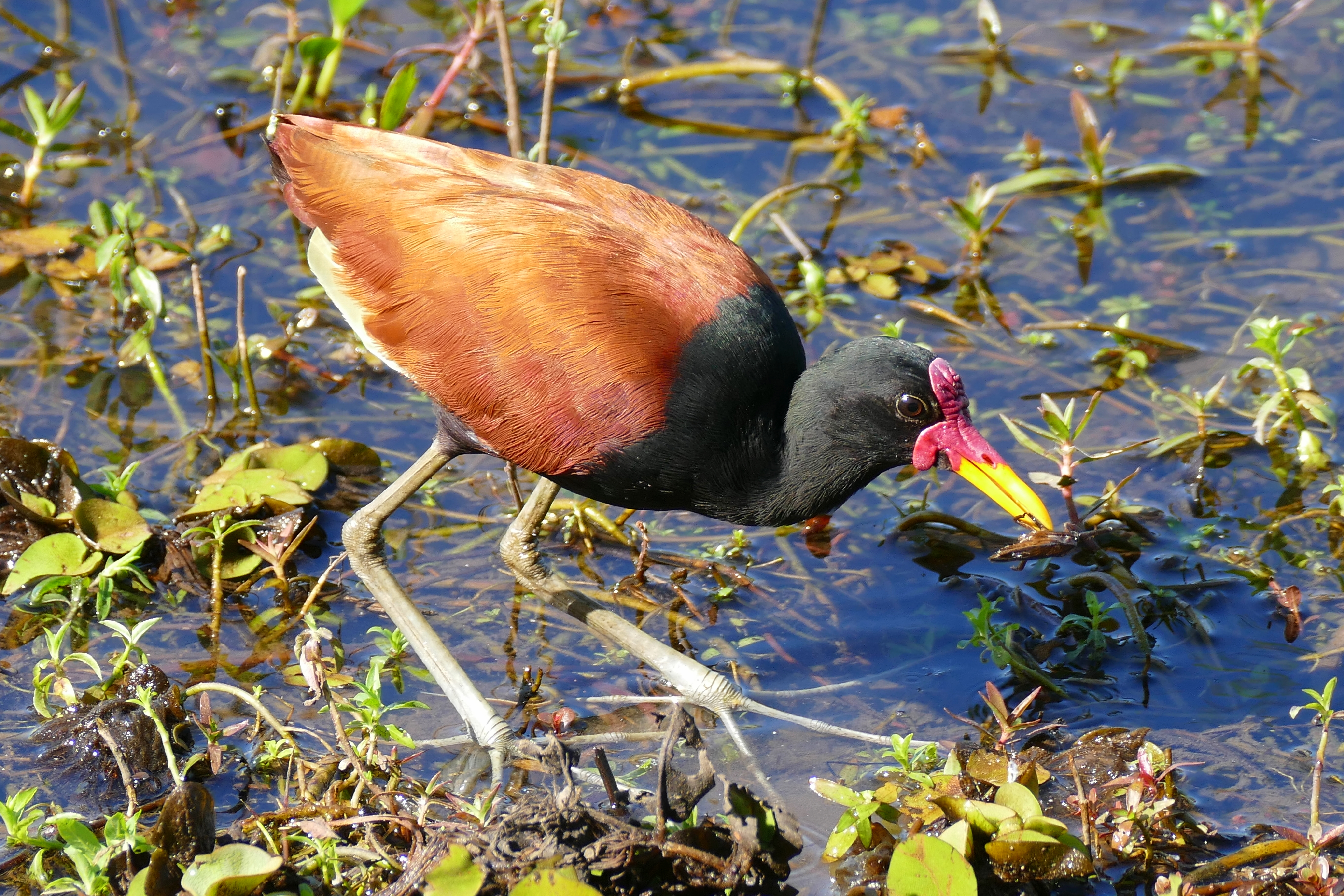 Pouso Alegre, Transpantaneira, Poconé, Mato Grosso, BRAZIL